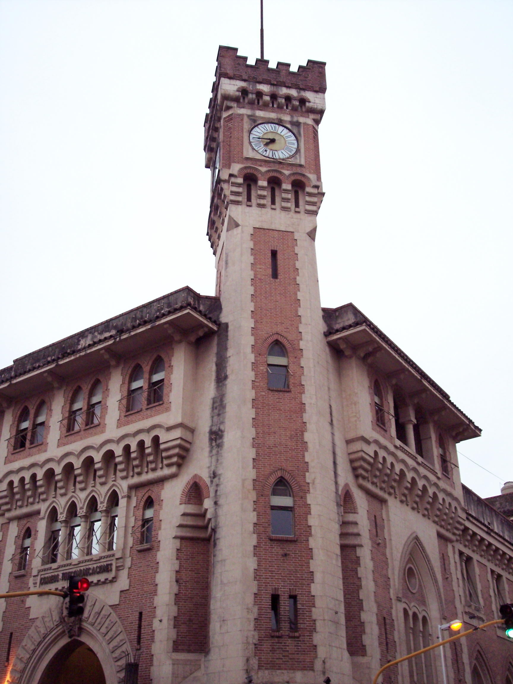 Edificio del Correo Central de San Miguel de Tucumán.